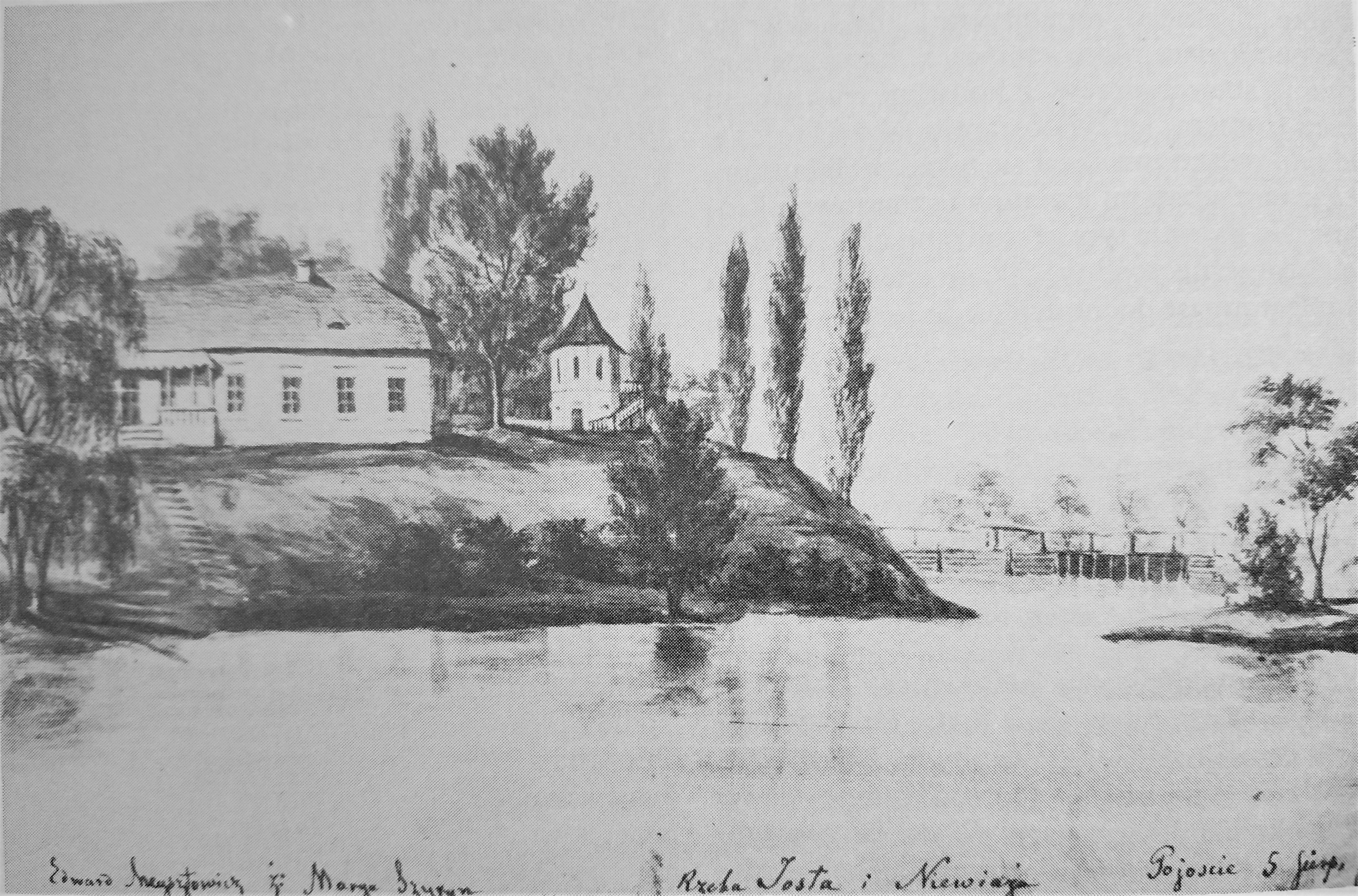 Szkic dworu Meysztowiczów i kaplicy w Pojościu (obecnie Pajuostis)